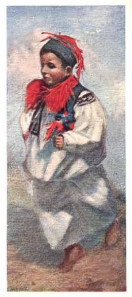 Obrázky Jožy Uprky na pohlednicích